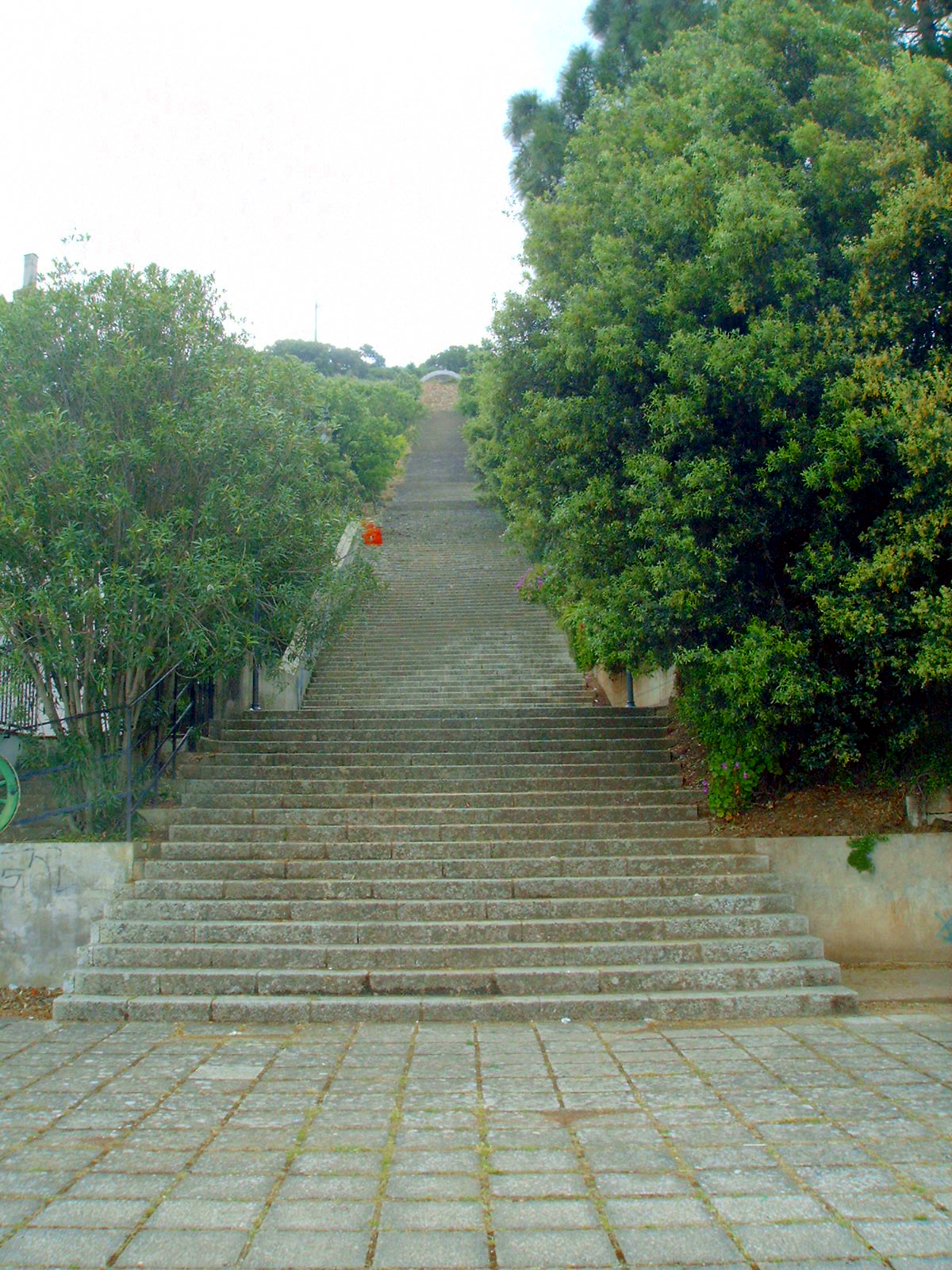 La gradinata,luogo simbolo di Gonnosfanadiga